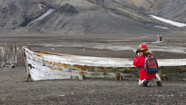 Ada Grilli